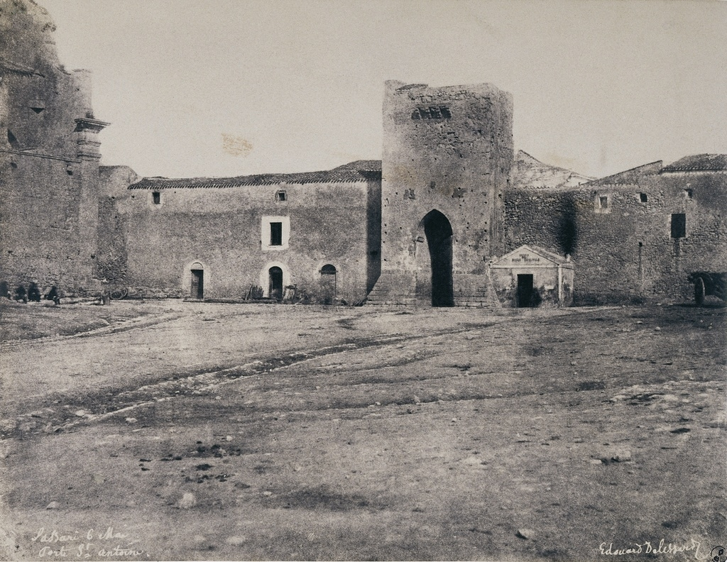 Sassari - Porta Sant'Antonio, 1854